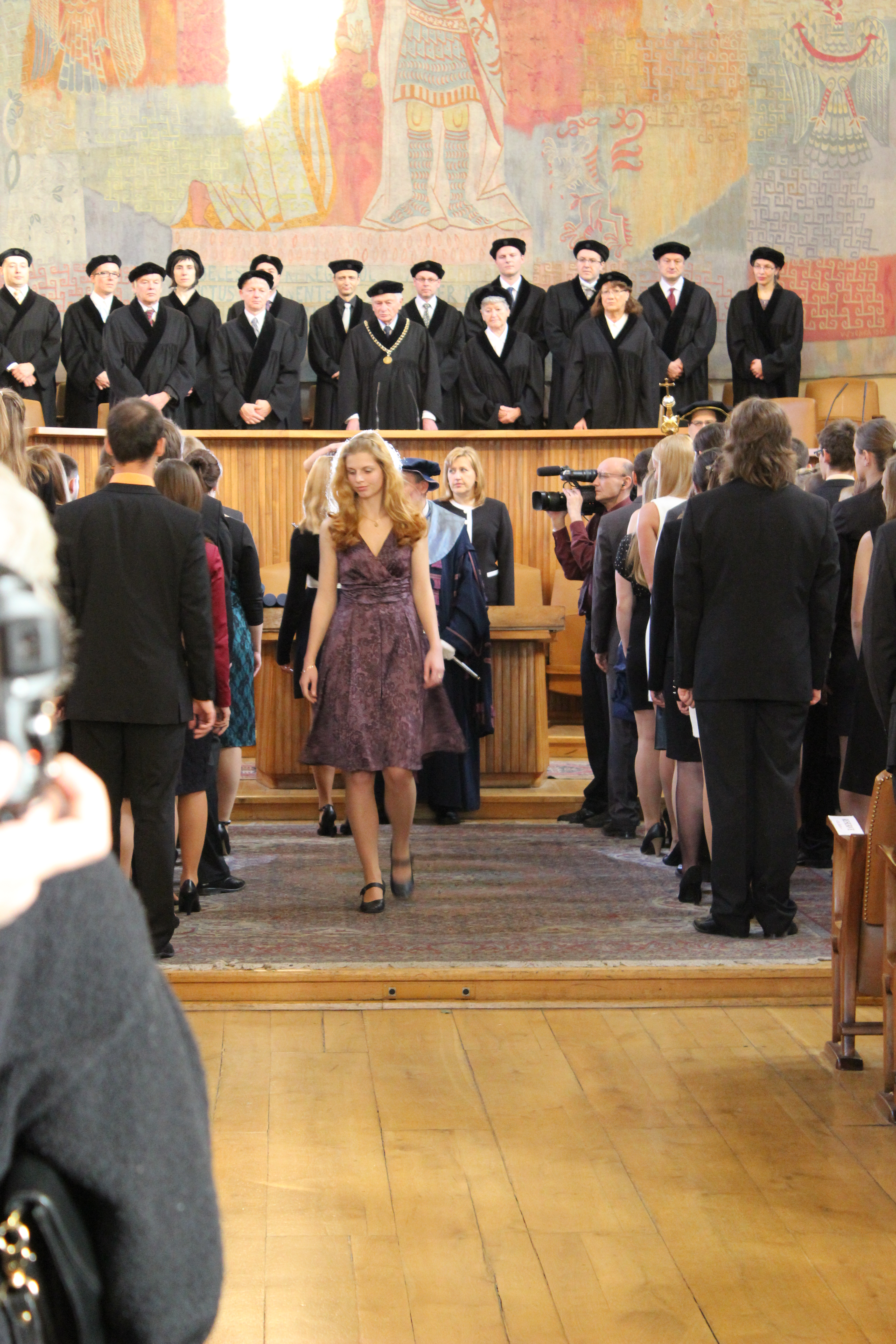 Promoční akt v Karolinu.